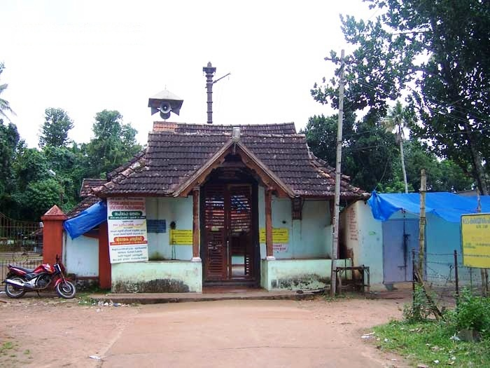 കിഴക്കേ ഗോപുരം-പരിപ്പ് മഹാദേവക്ഷേത്രം, അയ്മനം, കോട്ടയം ജില്ല